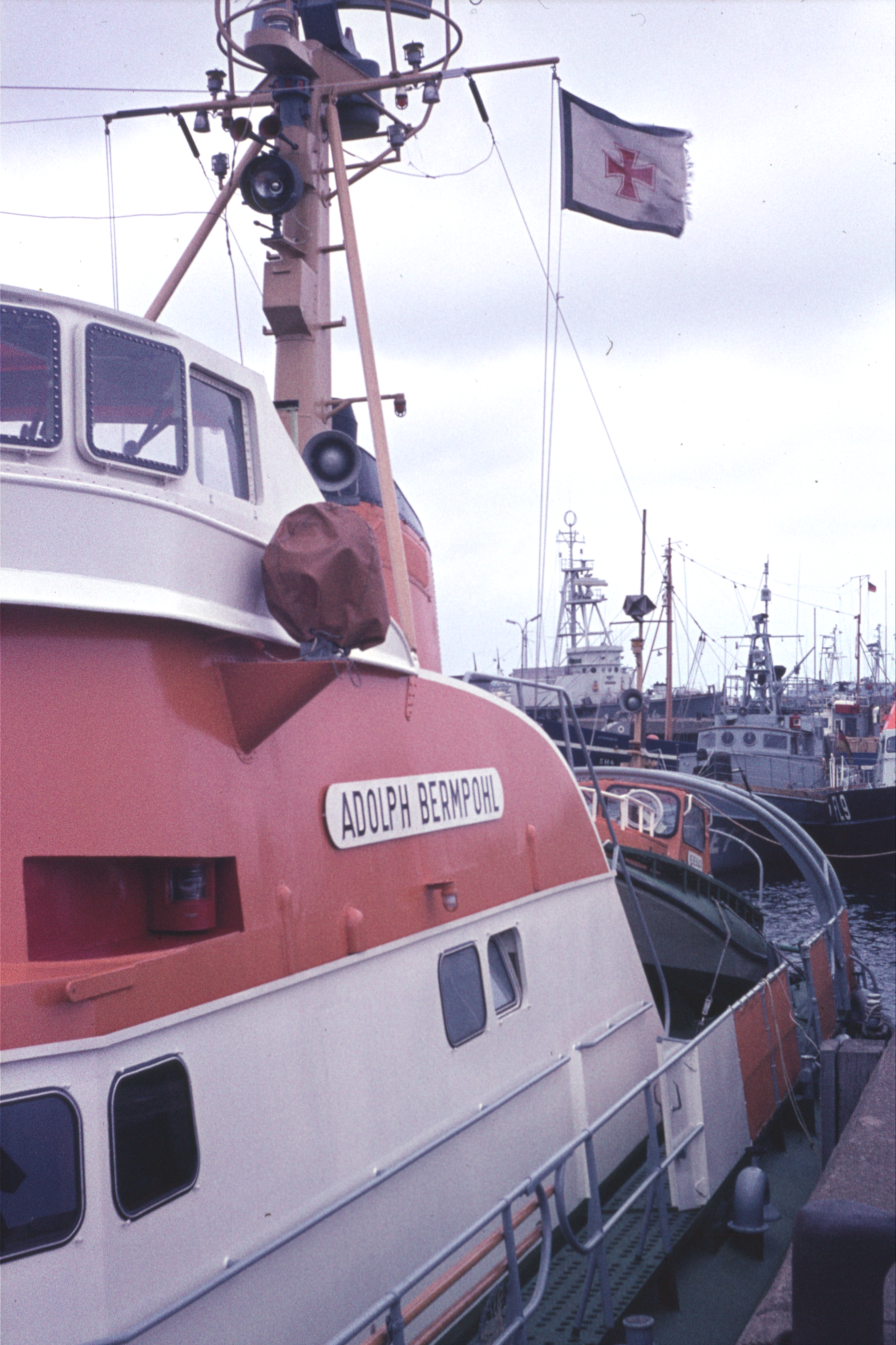 SK Adolph Bermpohl im Hafen von Helgoland